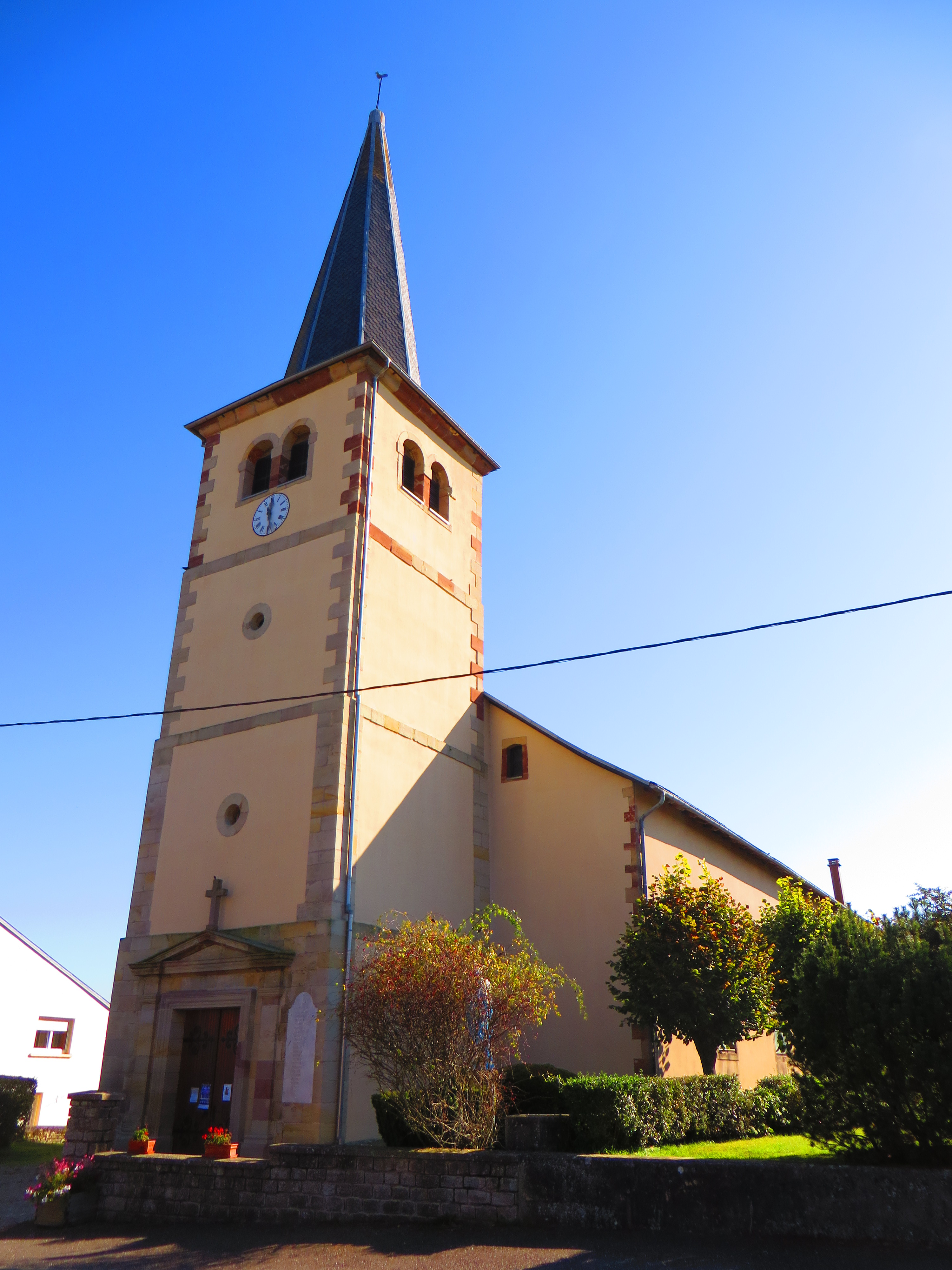 Gondrexange Église Saint-Luc